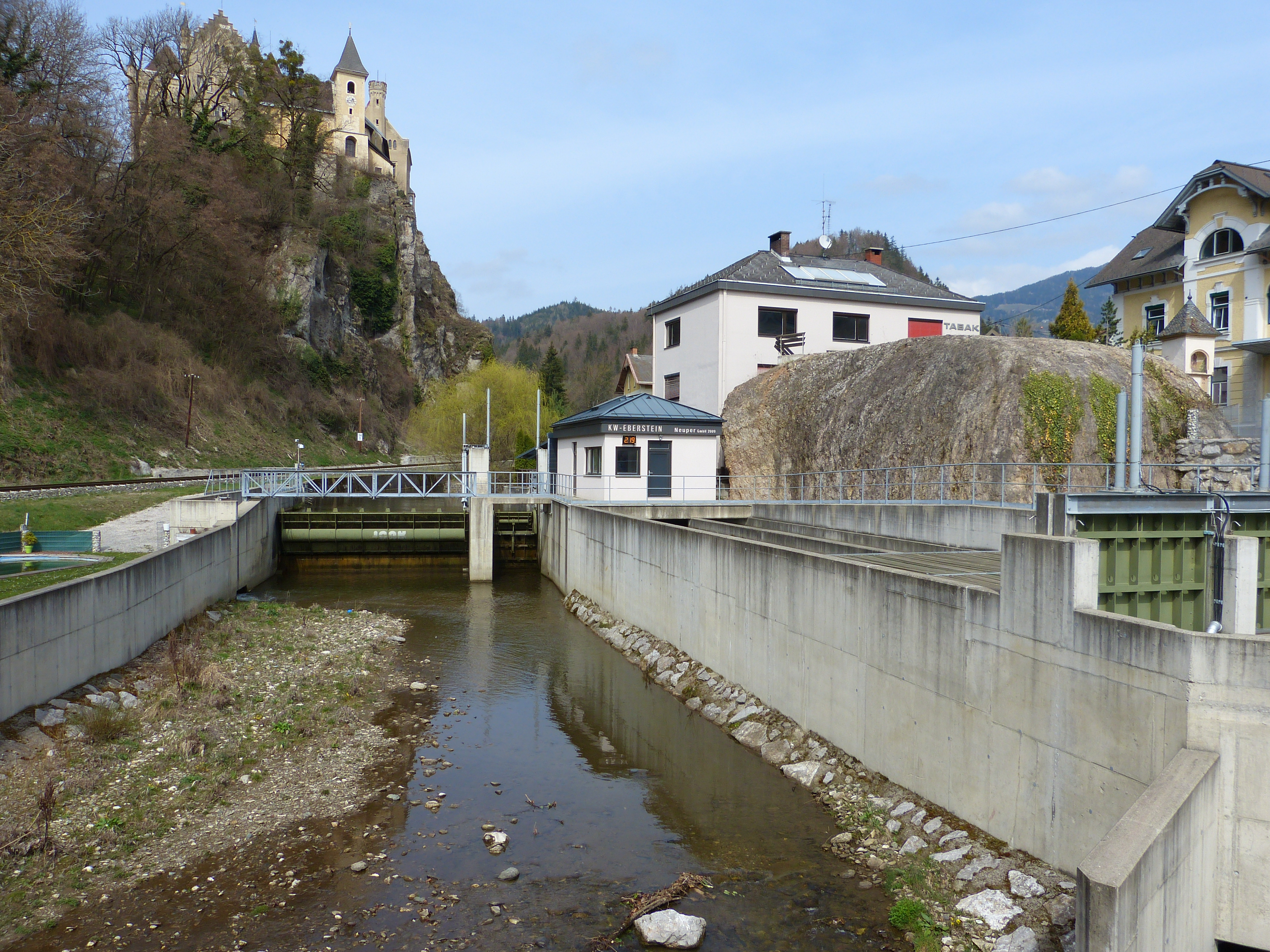 Kraftwerk Neuper in Eberstein (Kärnten), an der Görtschitz. errichtet 2009.